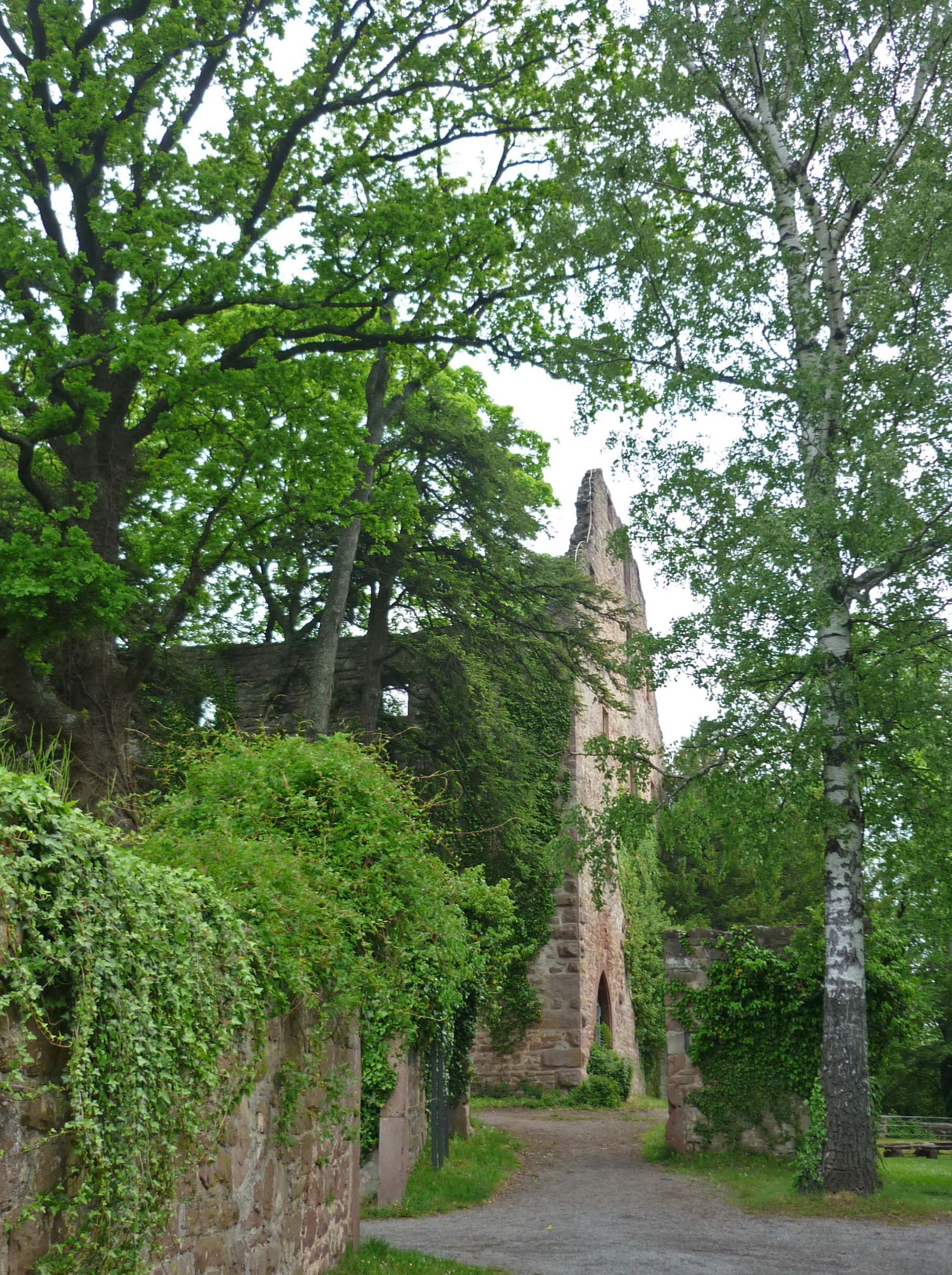 Ruine des Alten Schlosses Neuenbürg im Enzkreis (Württemberg)